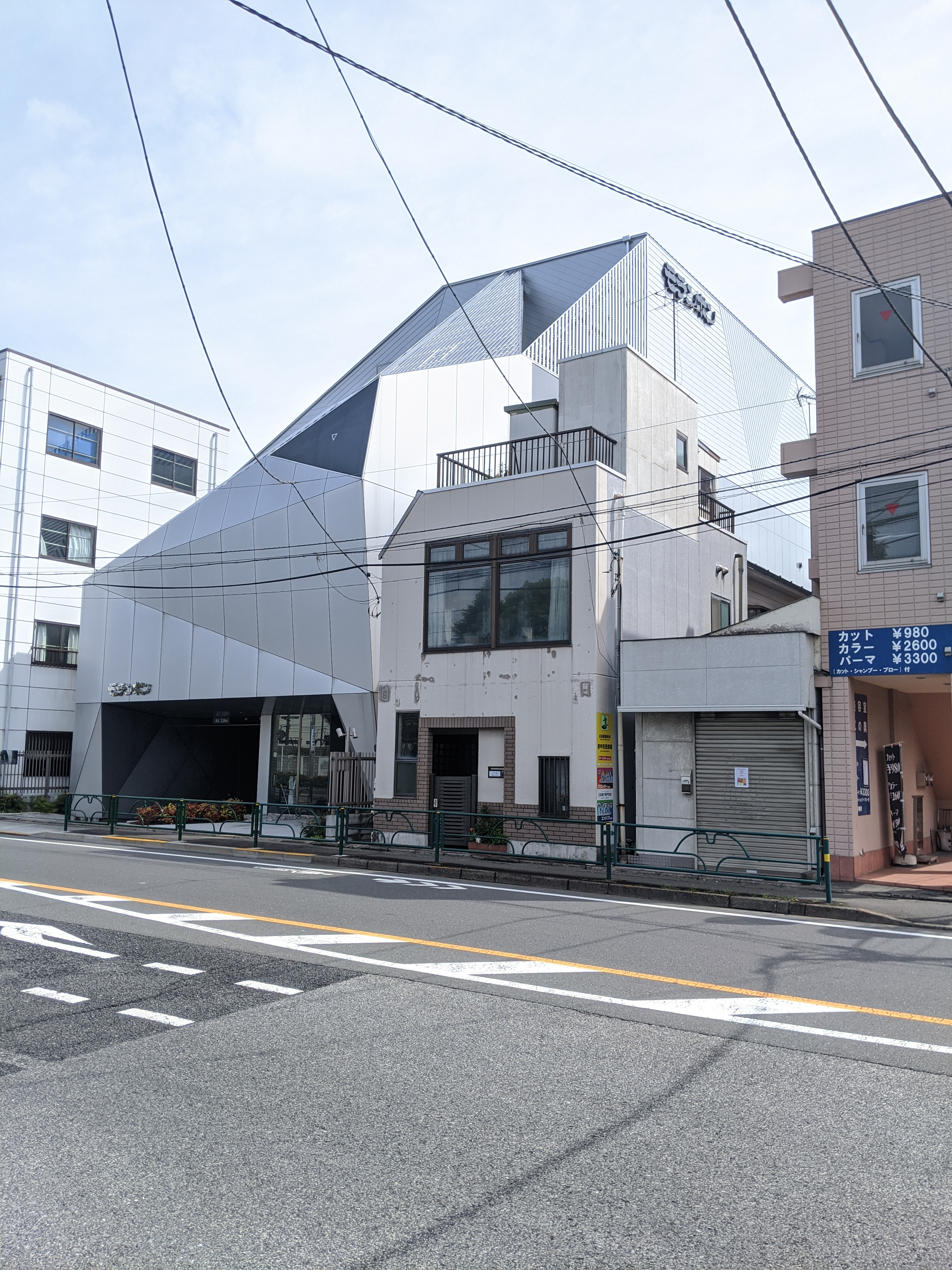 モランボン本社（東京都府中市）